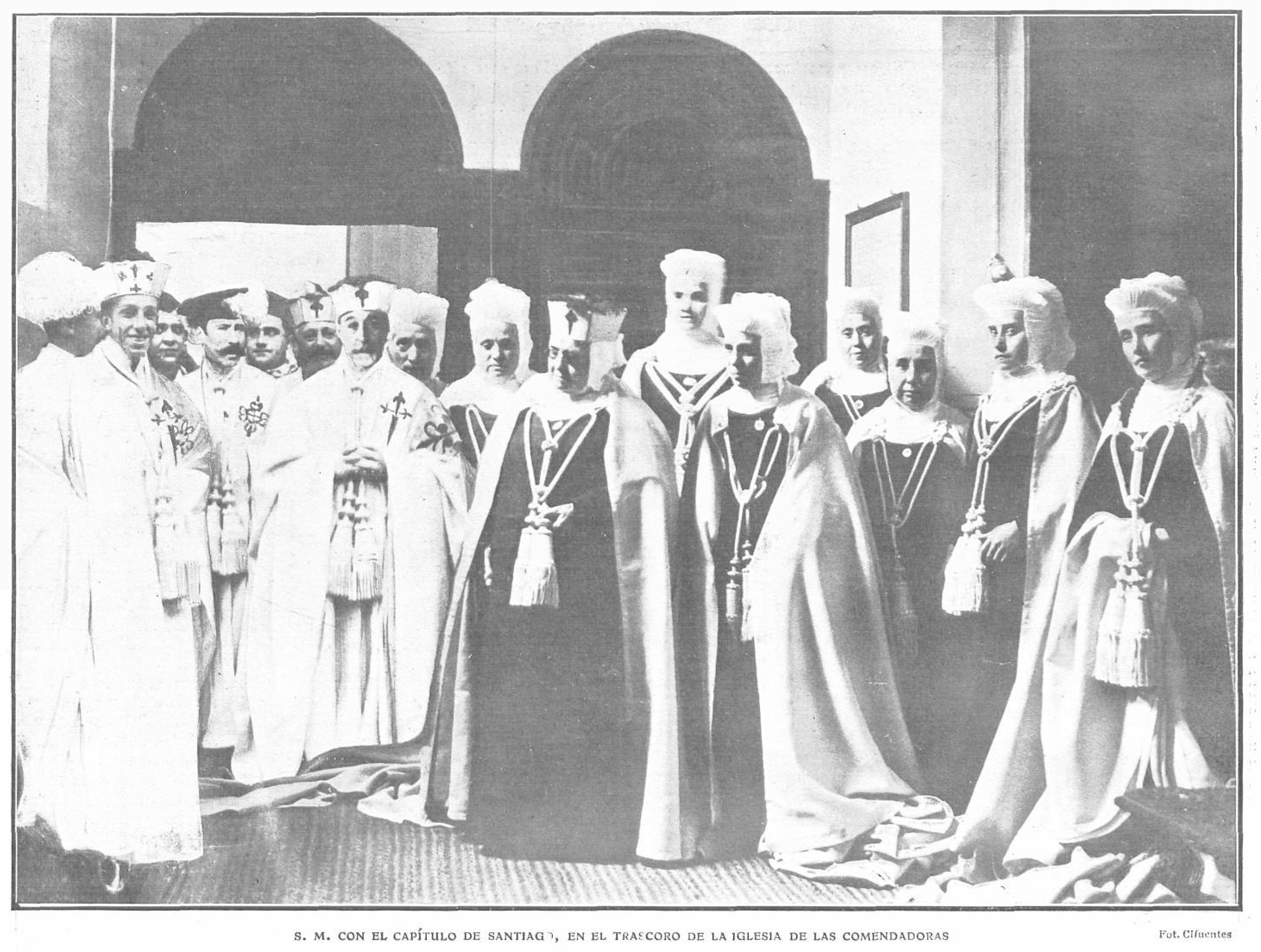 Alfonso XIII con el capítulo de Santiago en el trascoro de la iglesia de las Comendoras.